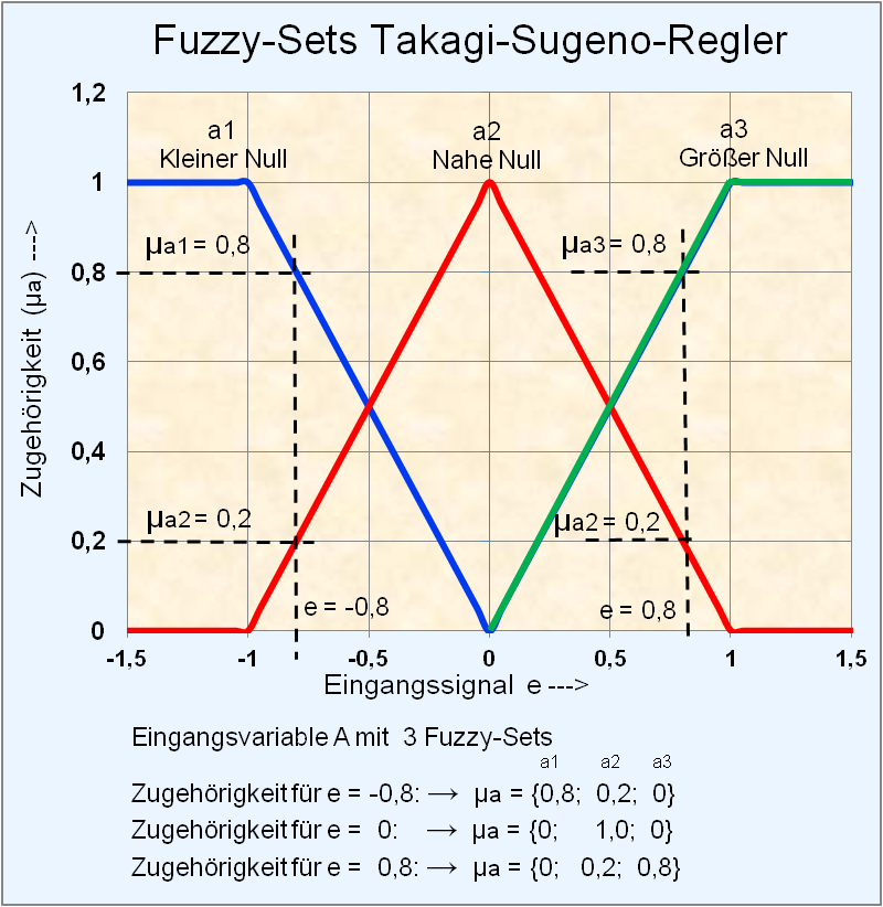 Grafische Darstellung von drei Fuzzy-Sets einer Grundmenge für einen Takagi-Sugeno-Regler.